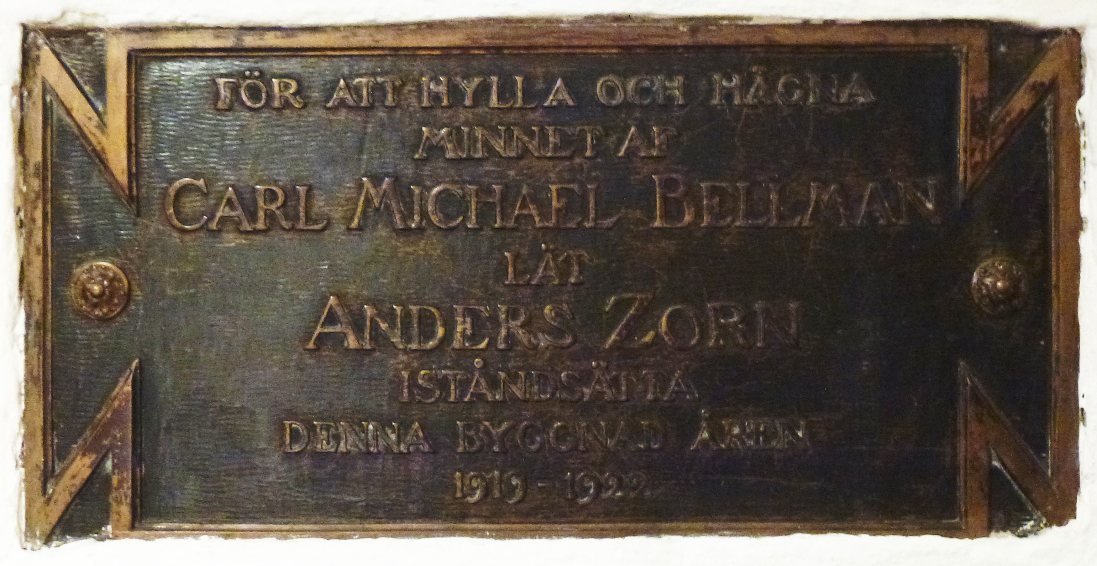 Den Gyldene Freden, minnestavla